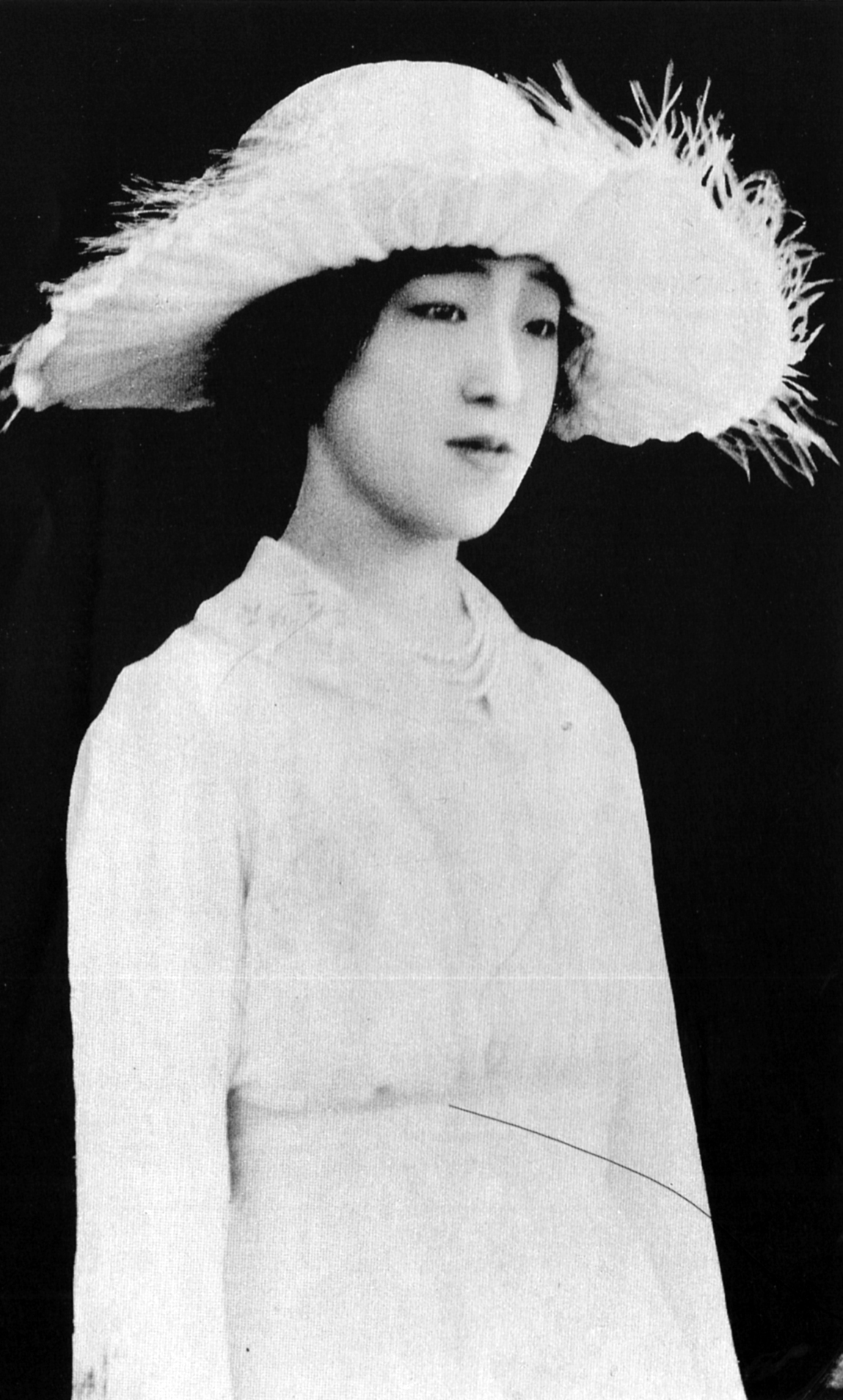 久邇宮良子女王（後の香淳皇后）。当時19歳(19 years old)。